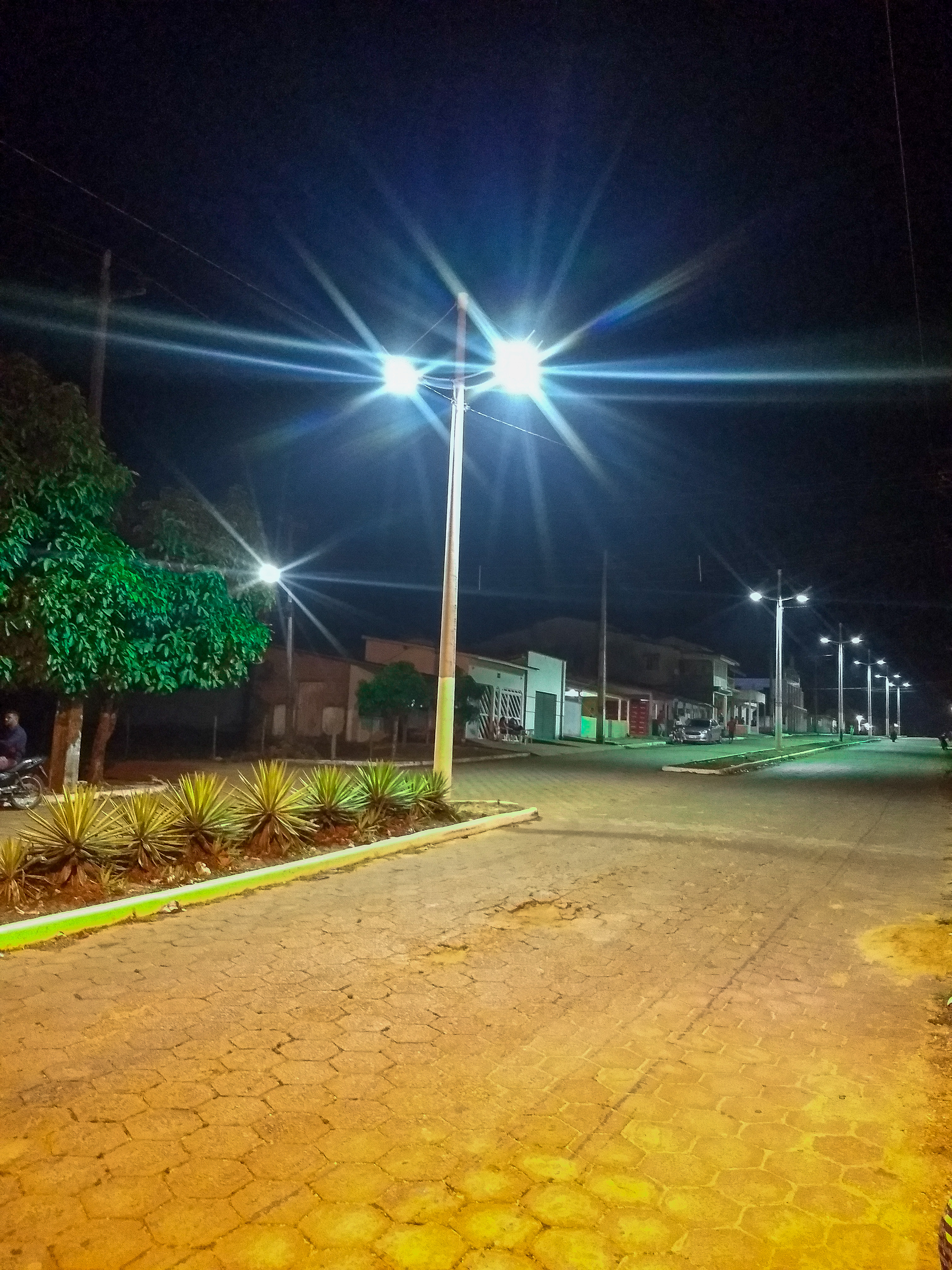 avenida central de madragoa noturna